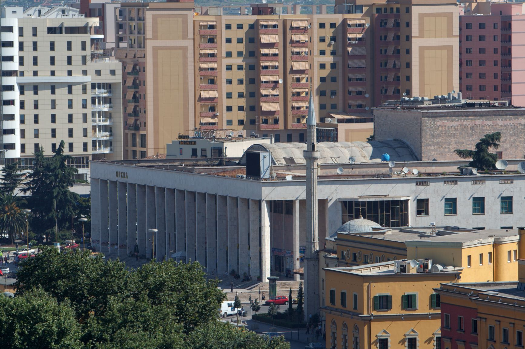 Taken in Tirana, Albania